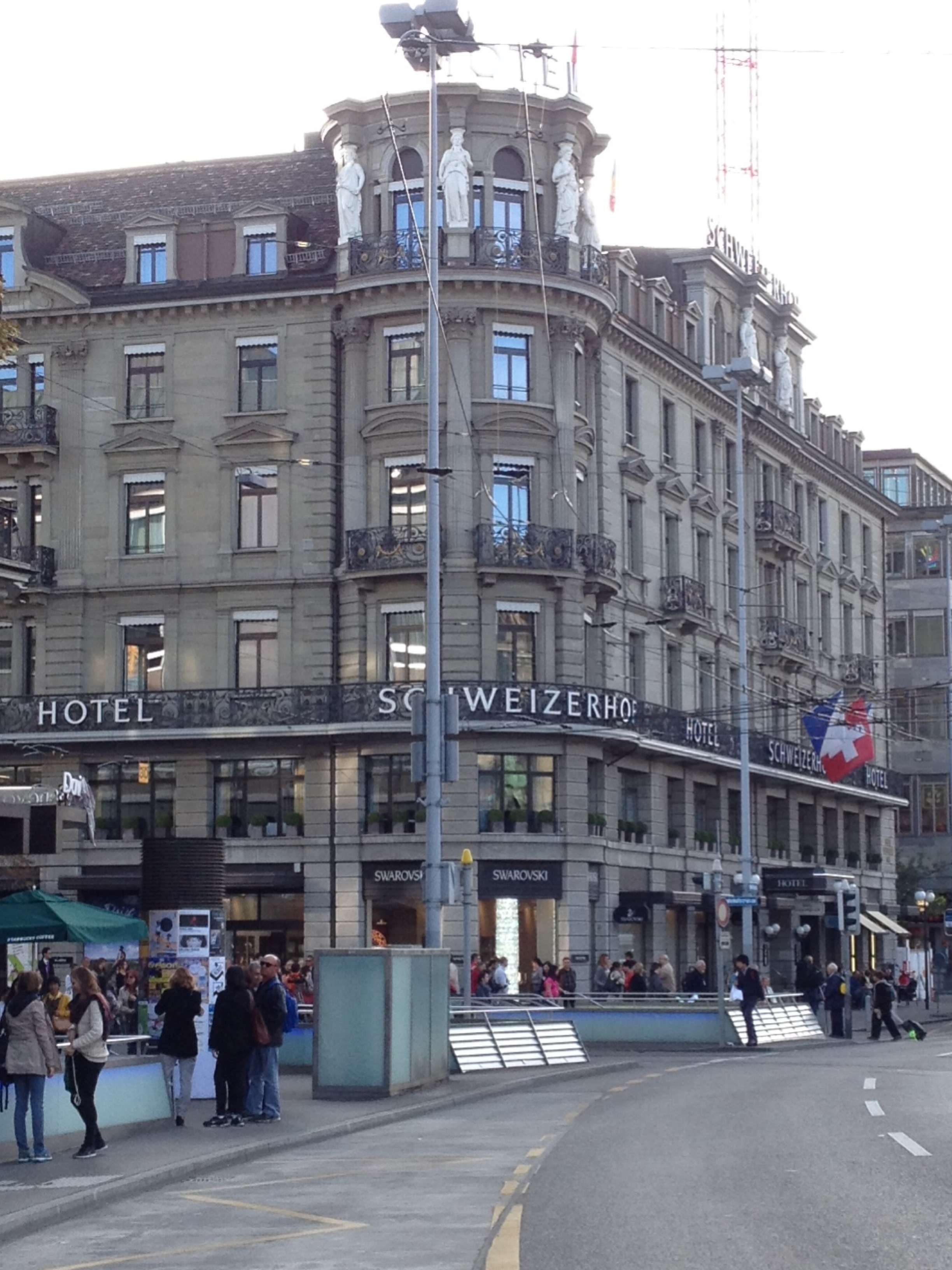 Hotel Schweizerhof, Zürich, ID AA1435